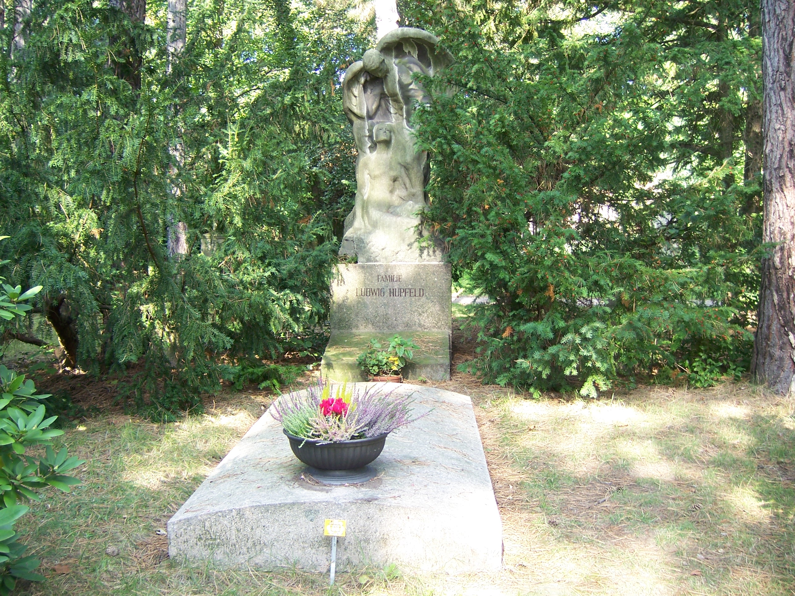 Grabstätte Familie Hupfeld